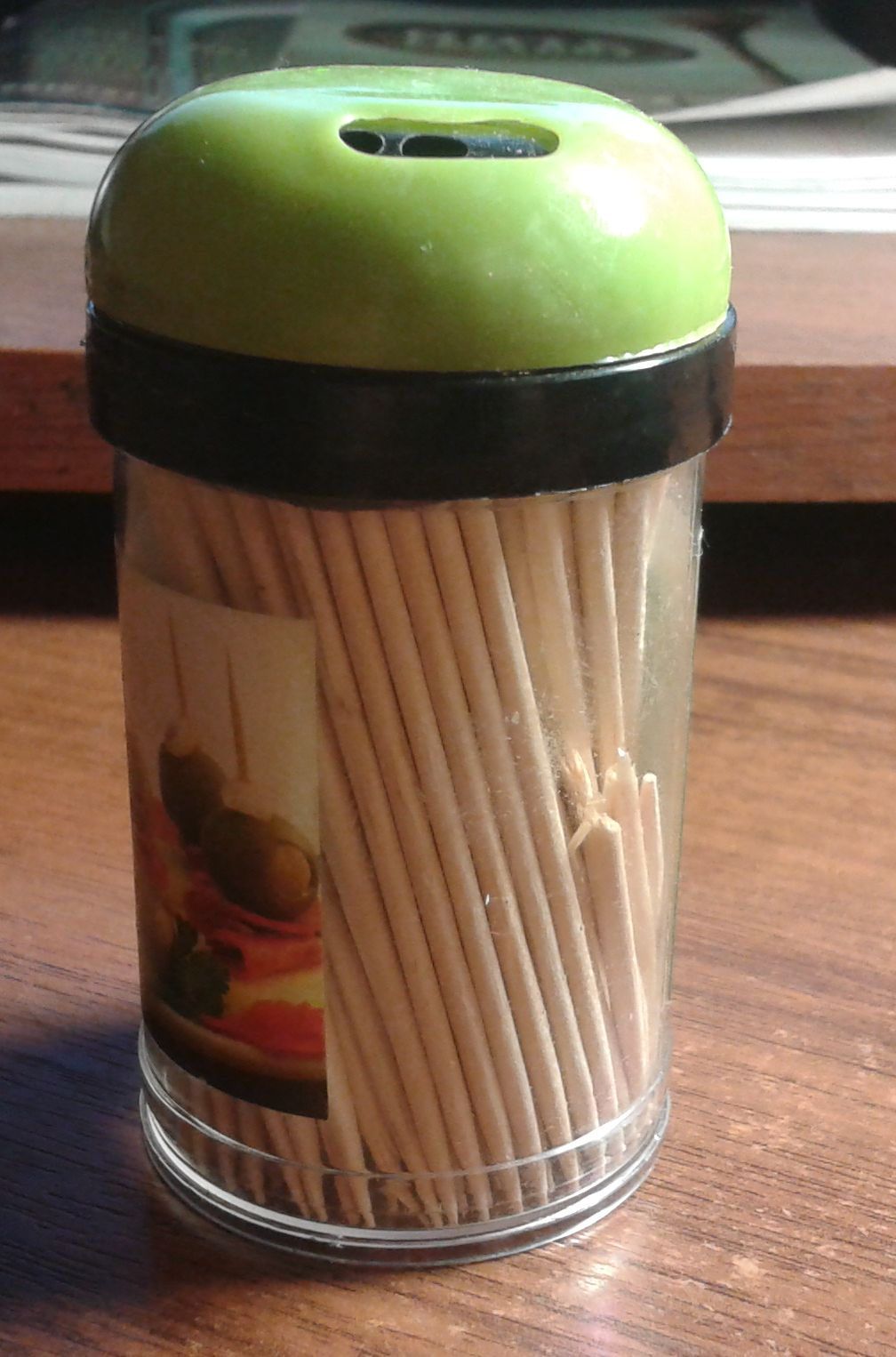 зубочистки